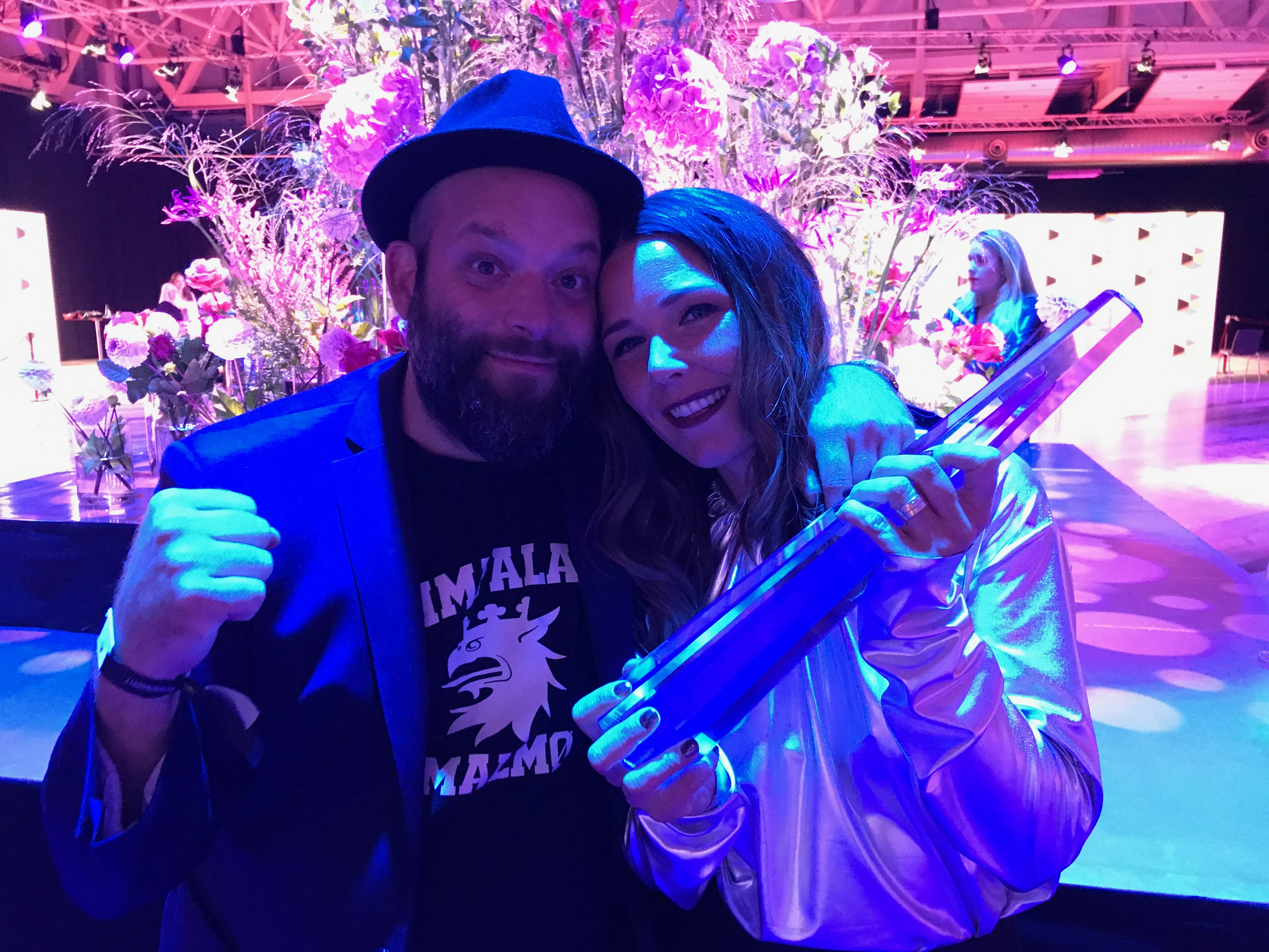 Beppe Singer tillsammans med producenten för Viaplays Det Stora Experimentet efter de mottagit en kristall för Årets Barn- och Ungdomsprogram vid Kristallengalan 2017.